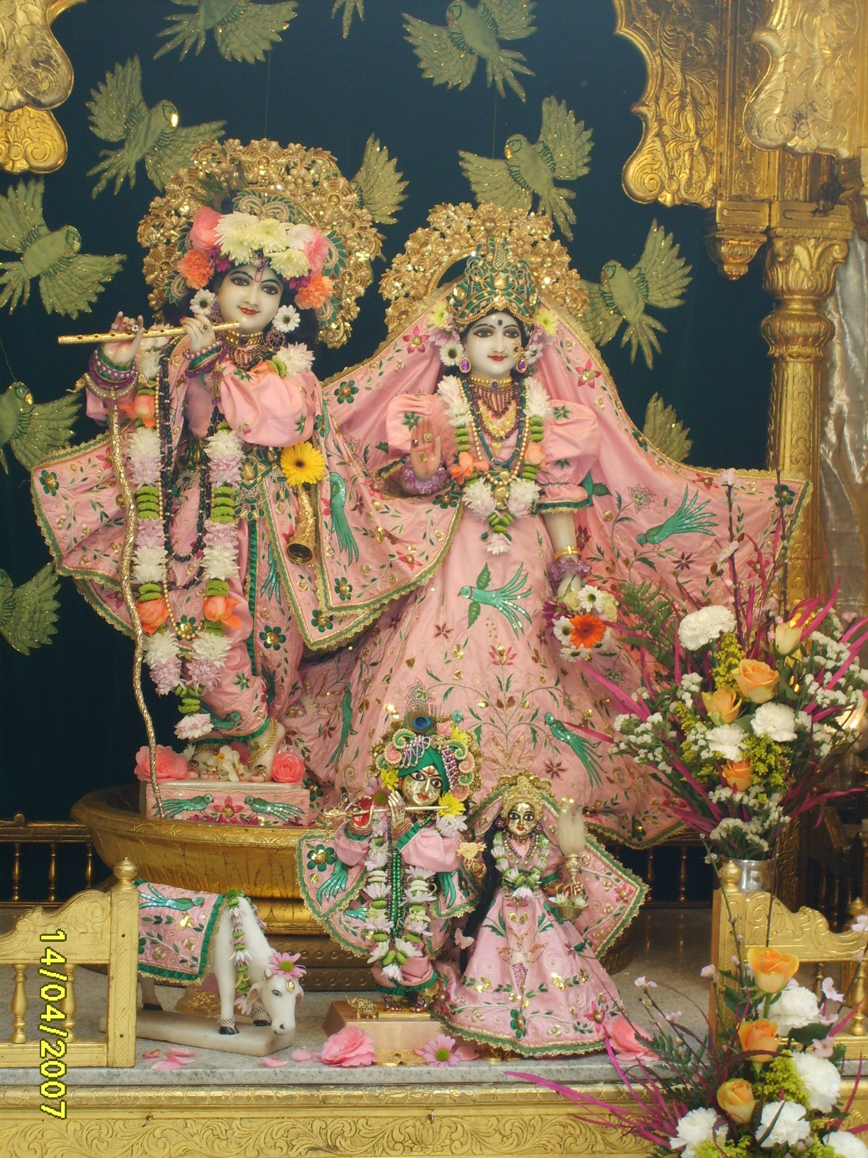 Sri Sri Radha gokulananda, the preciding deities in Bhakti Vedanta Manor (ISKCON), London, UK